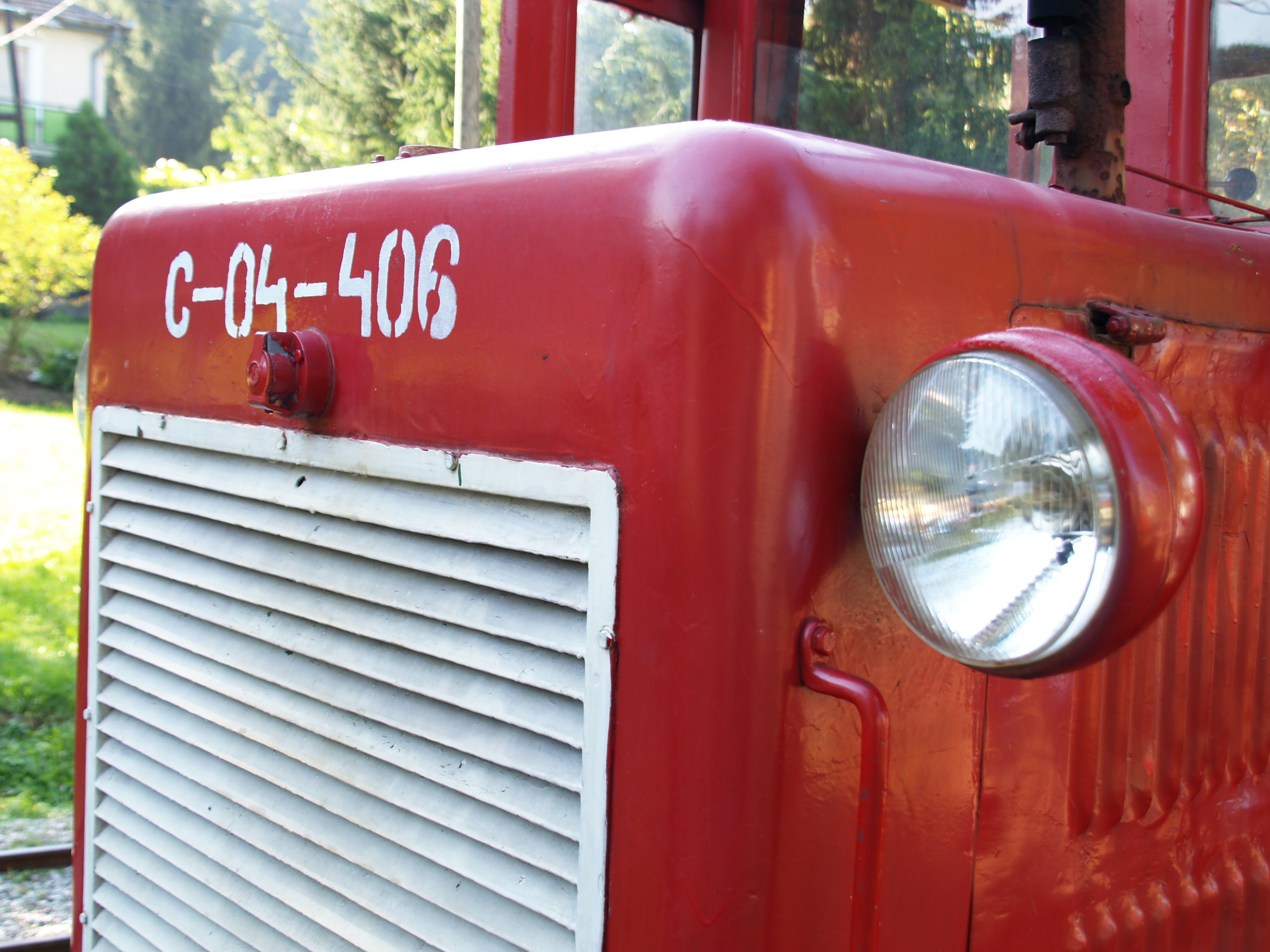 A FÁEV C-50-es dízelmozdonyának eleje, Felsőtárkány